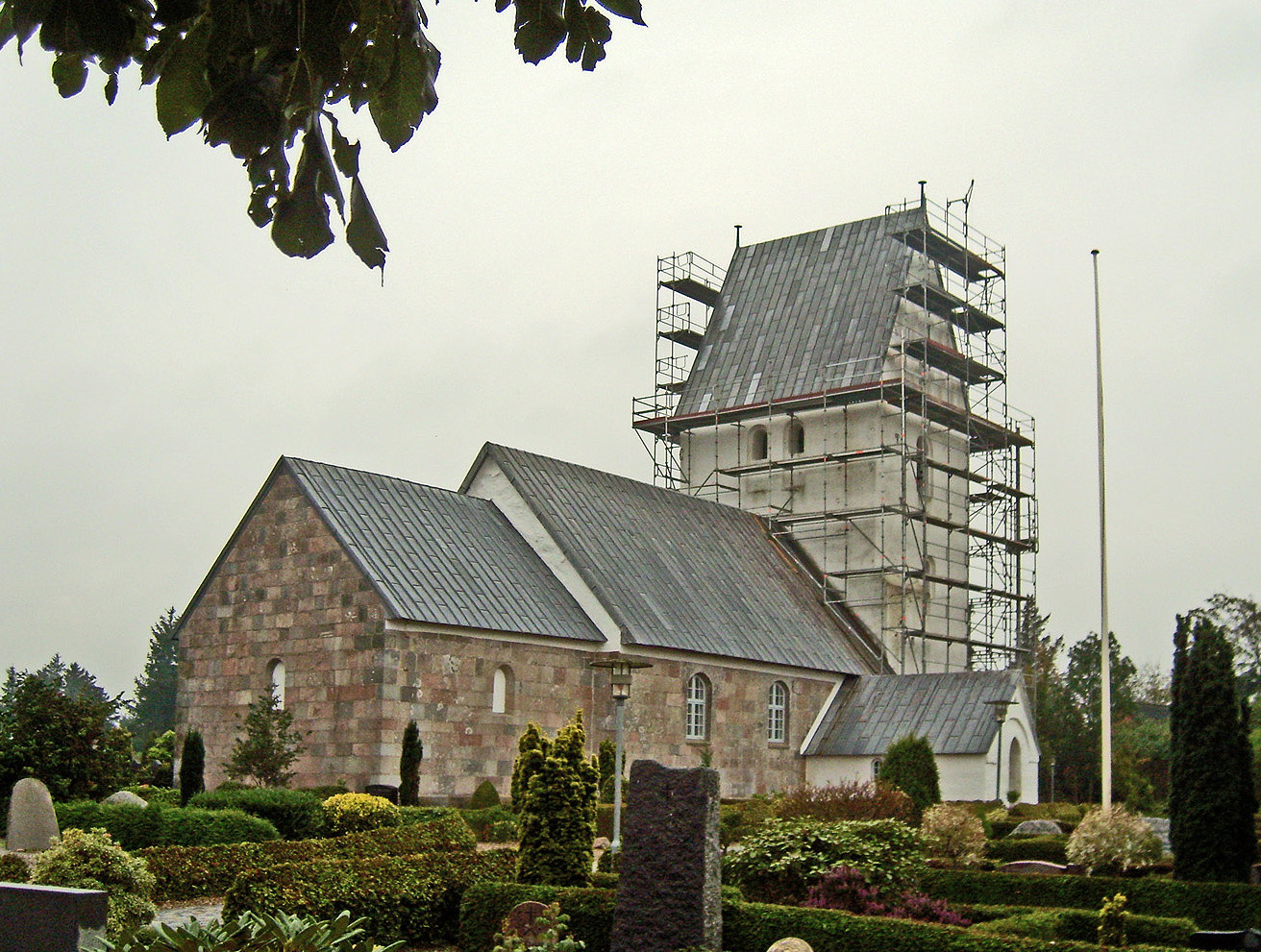 fra nordøst